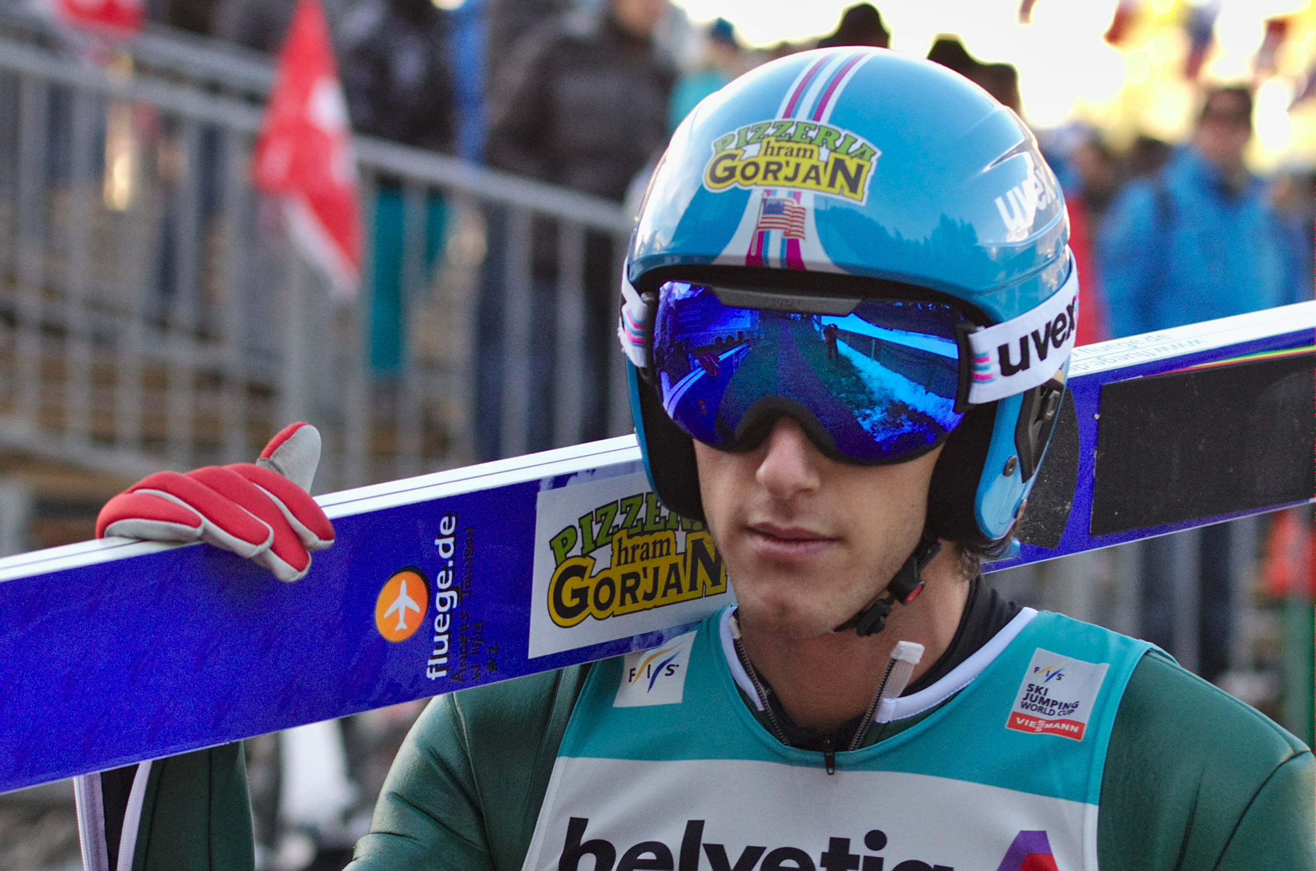 FIS Ski Jumping World Cup 2014 - Engelberg - 20141221 - Anders Johnson